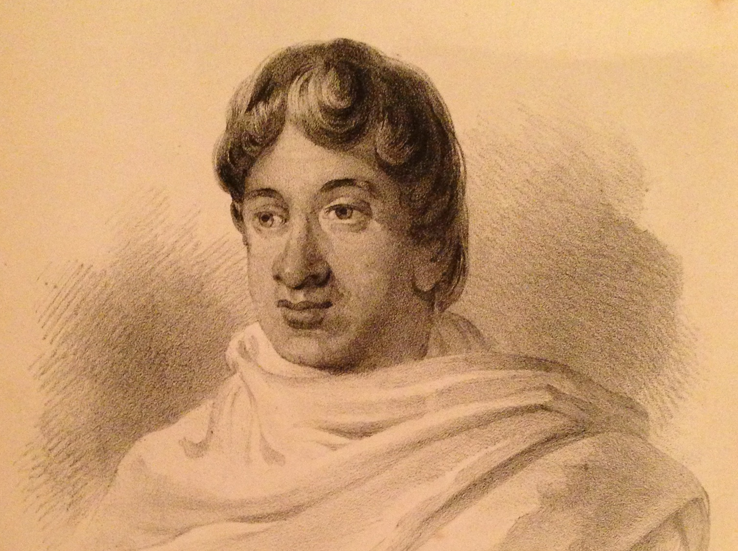 Radama, Late King of Madagascar, by William Ellis (1838) (detail)